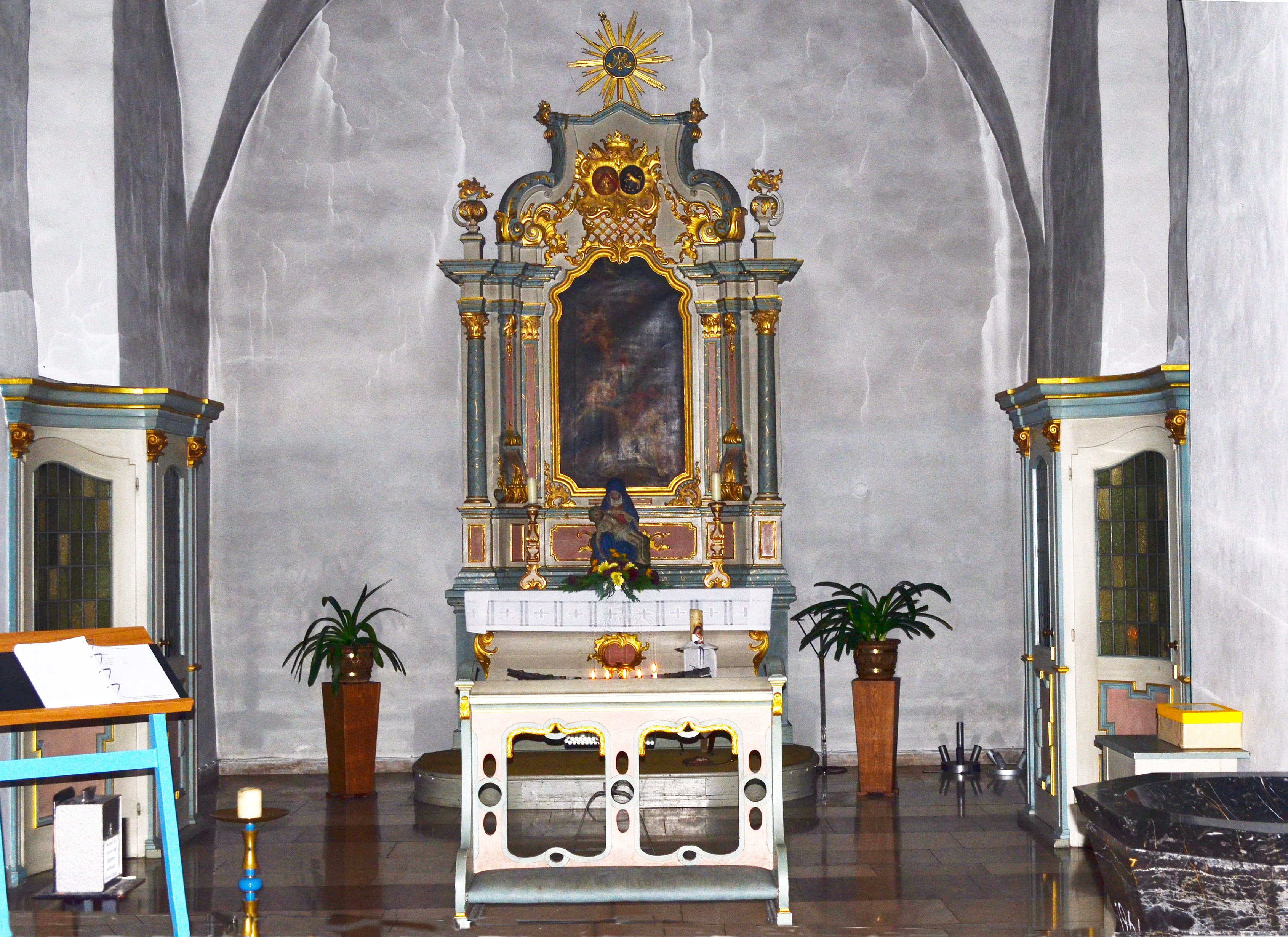 Alme, St. Ludgerus, Seitenalatar und Beichtstühle